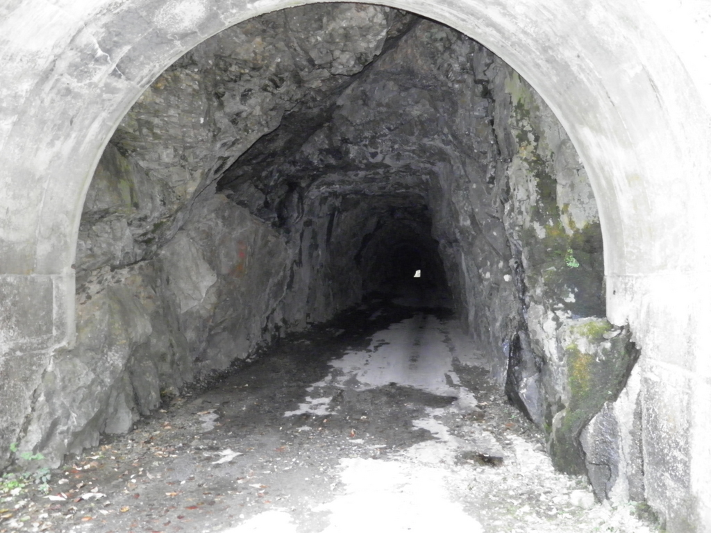 小南峠隧道の内部。フラッシュを使って撮影。（奈良県吉野郡黒滝村）